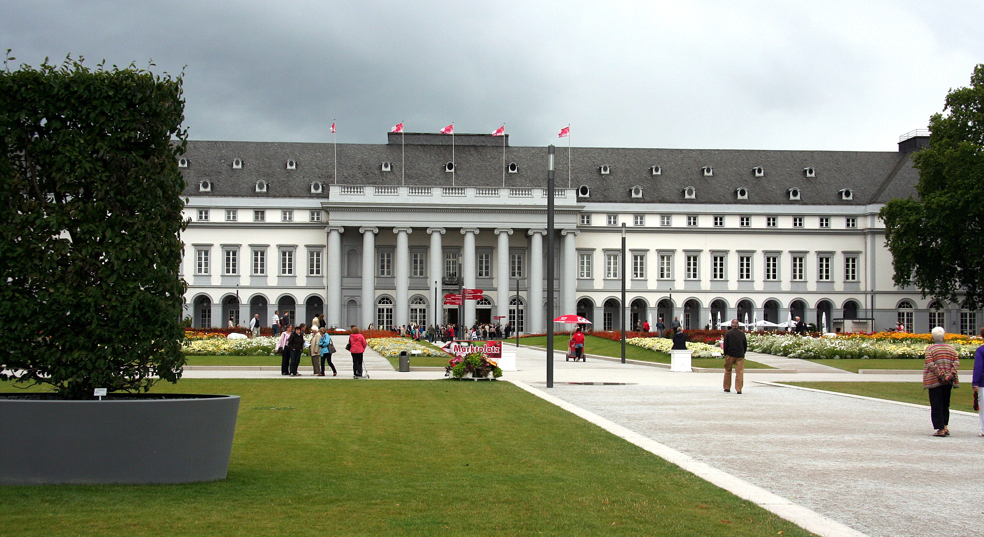 Kurfürstlichen Schlosses von Koblenz, Residenz des letzten Trierer Kurfürsten Clemens Wenzeslaus von Sachsen